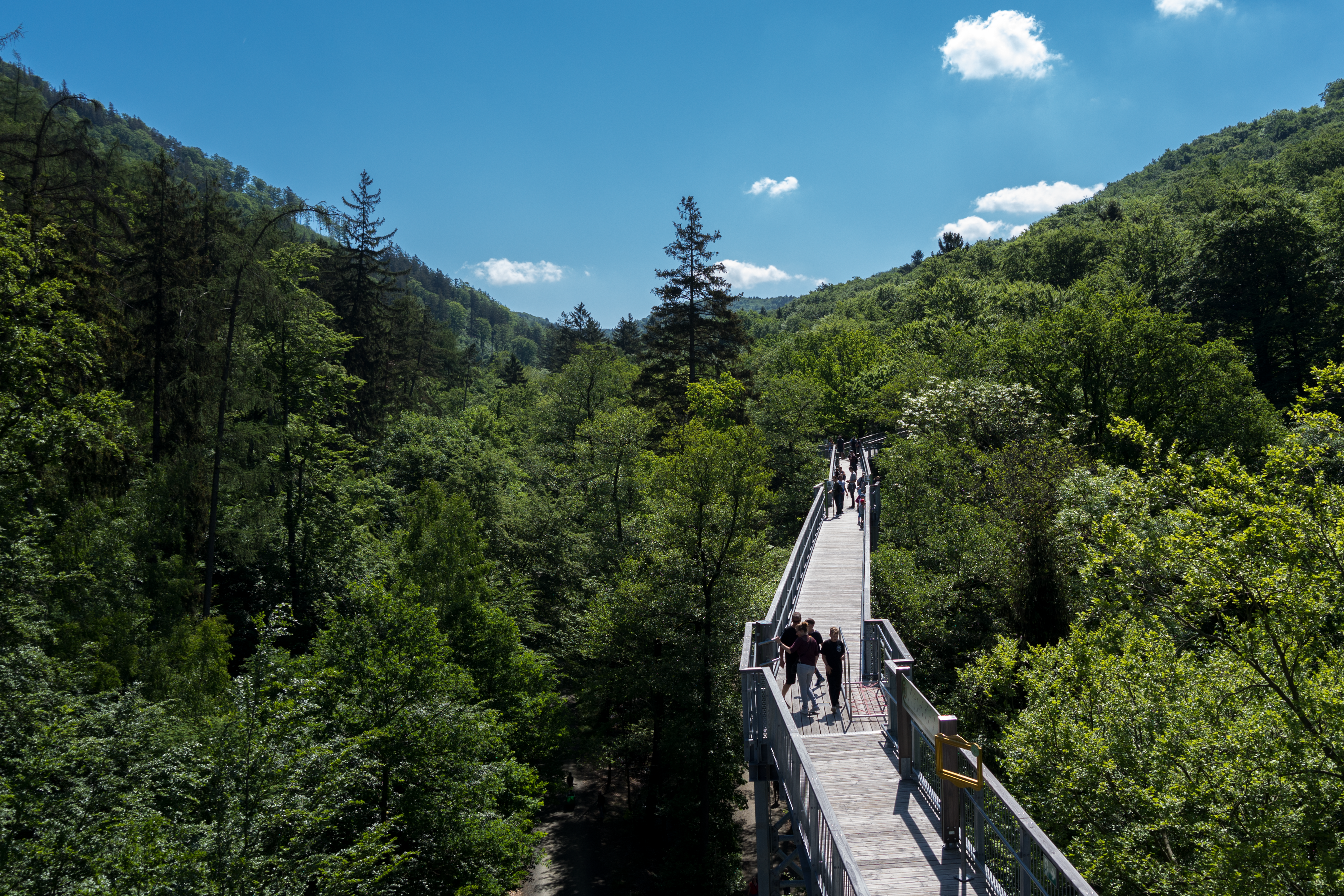 Blick auf den Baumwipfelpfad Bad Harzburg, Nationalpark Harz